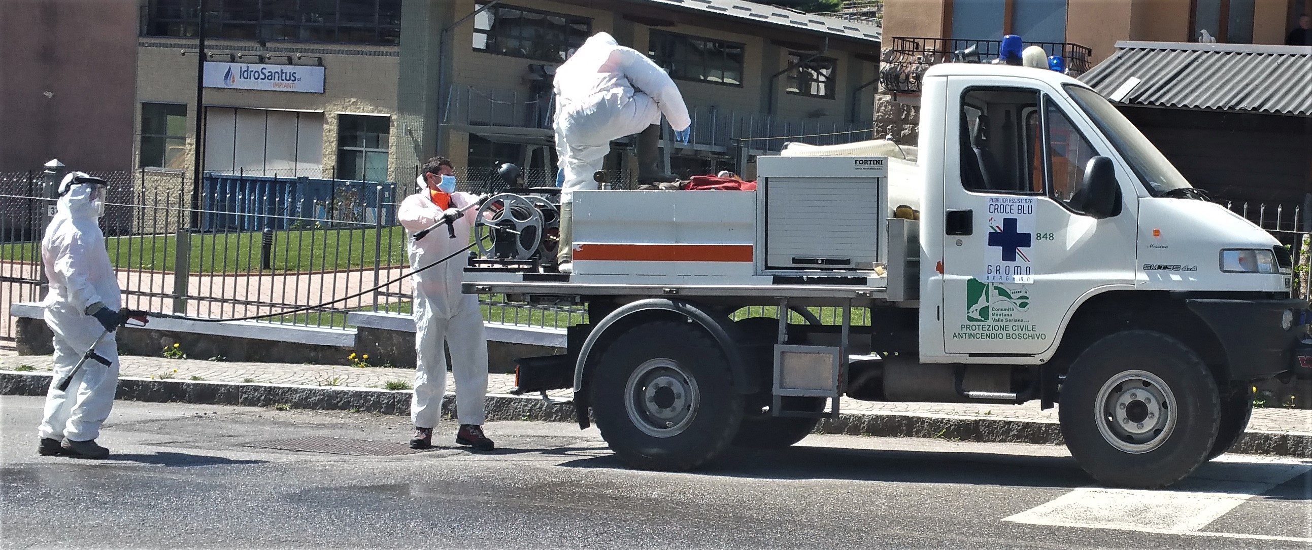 Mezzi della protezione civile a sanificare per covid-19